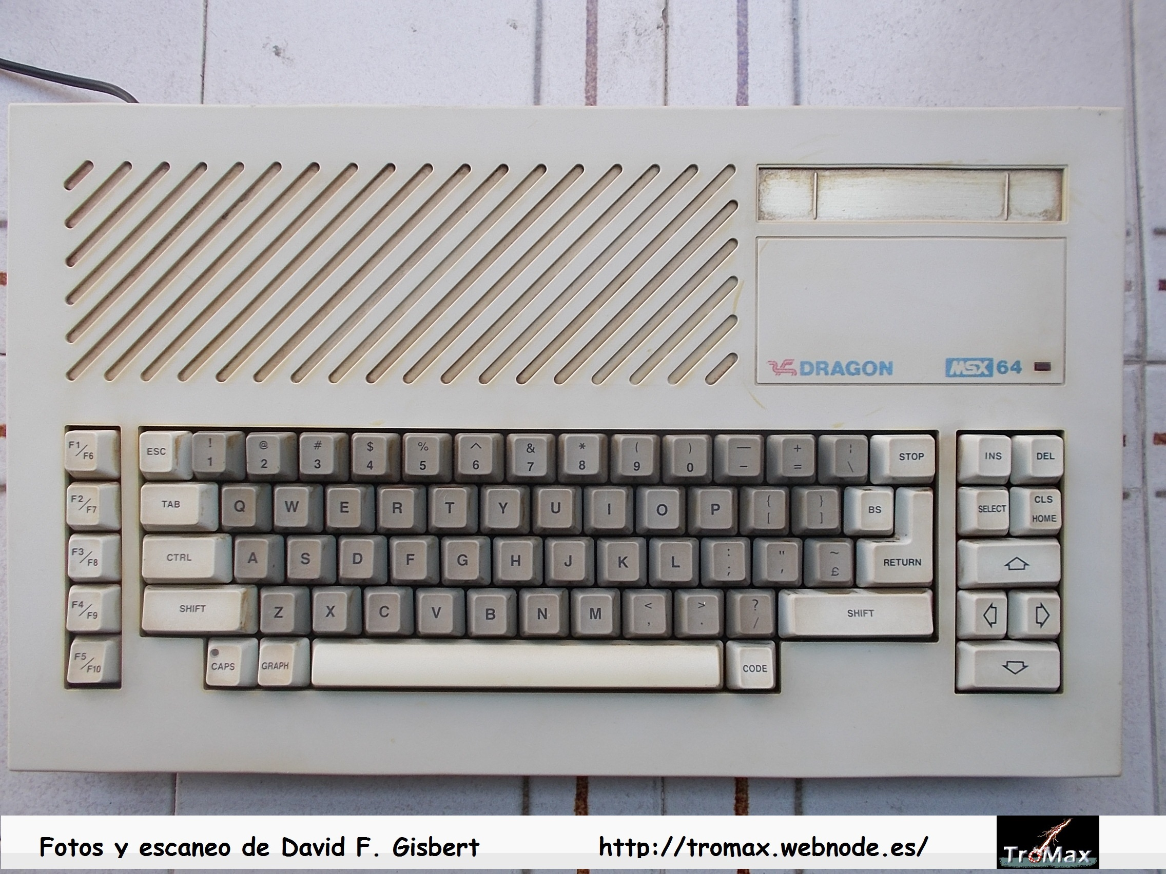 Msx Dragon